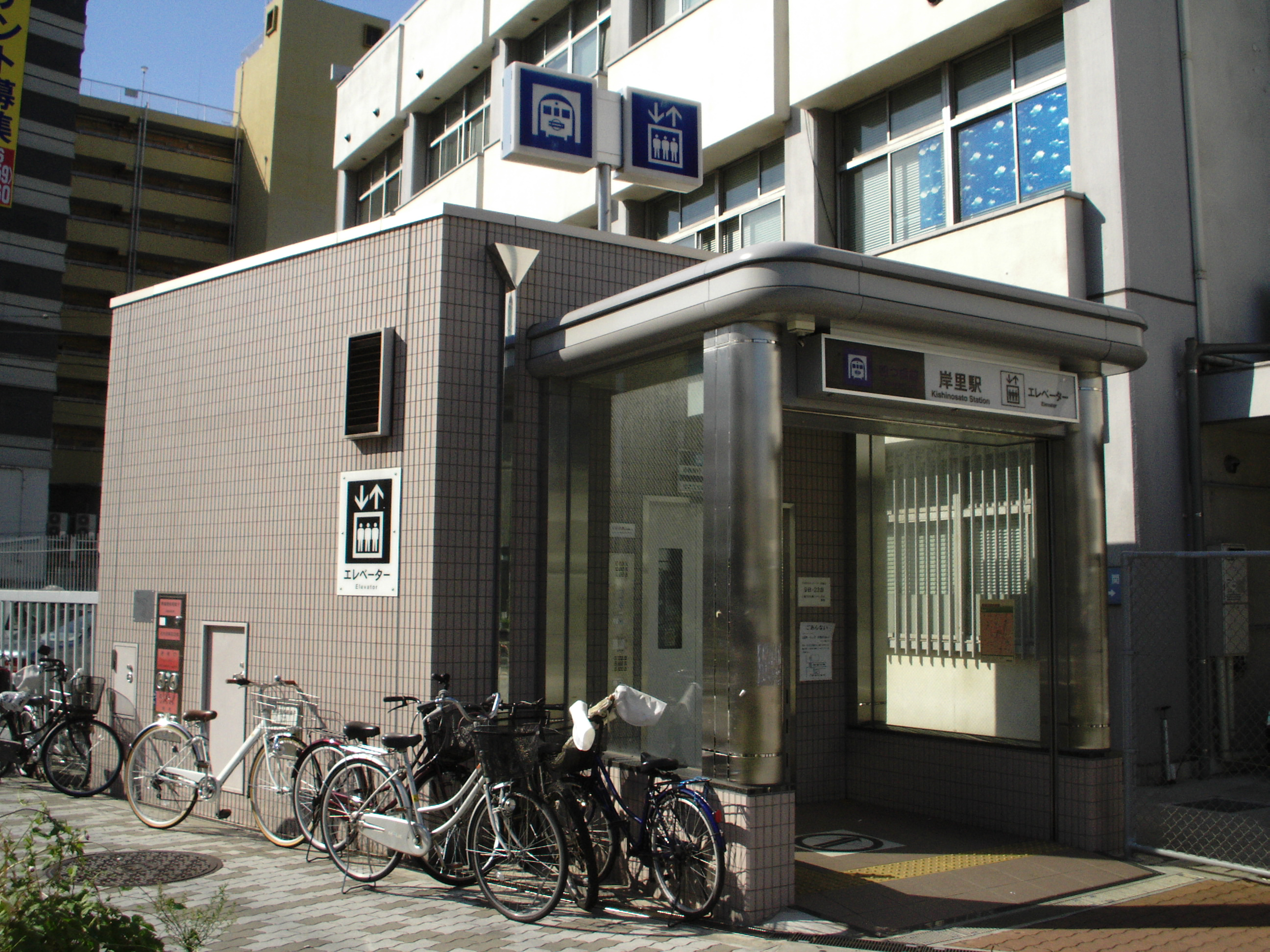 大阪市営地下鉄岸里駅